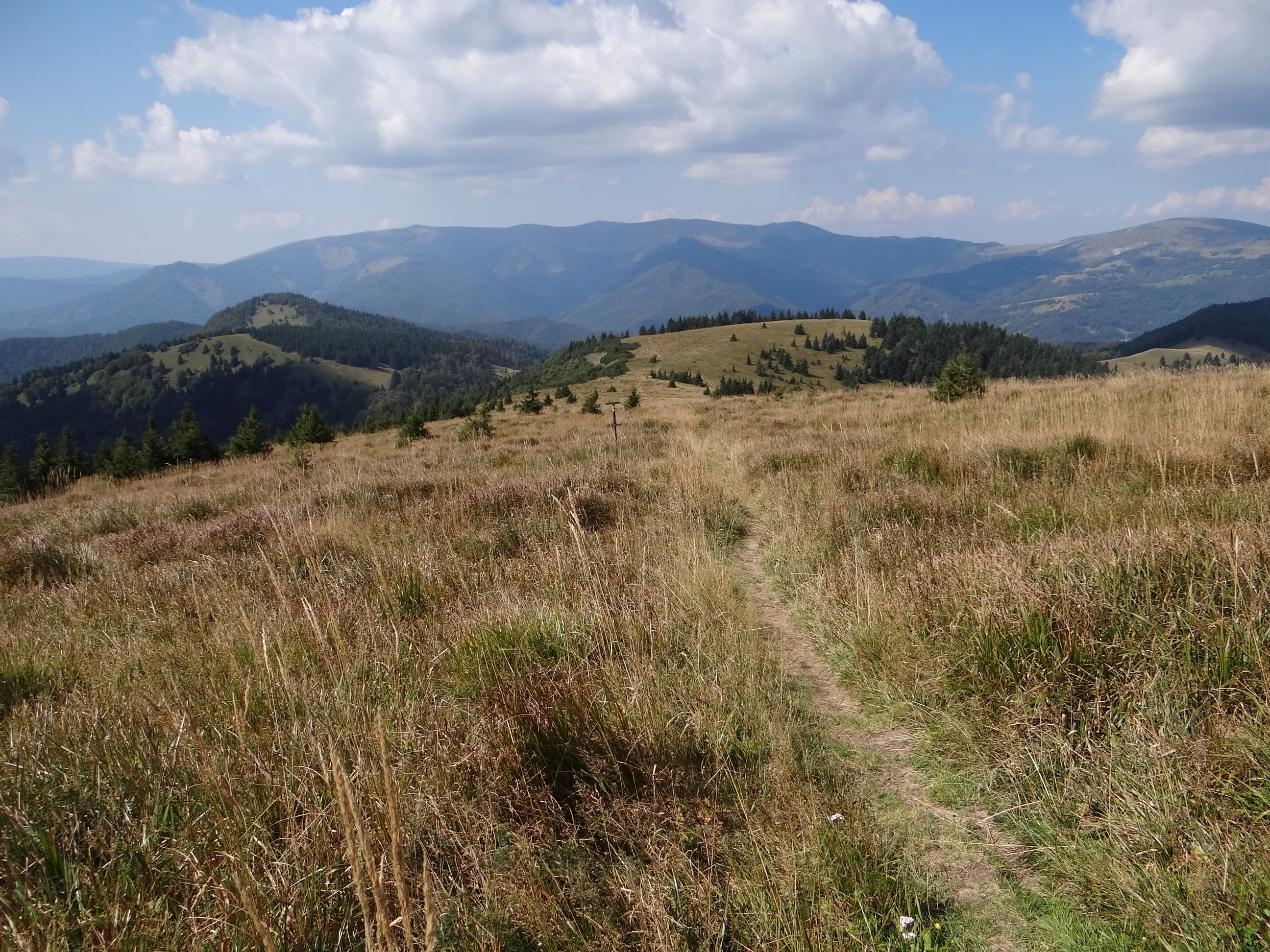 Motyčská hoľa